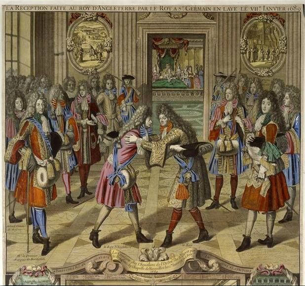 "La Reception faite au Roy d'Angleterre par le Roy à St. Germain en Laye le VIIe janvier 1689"